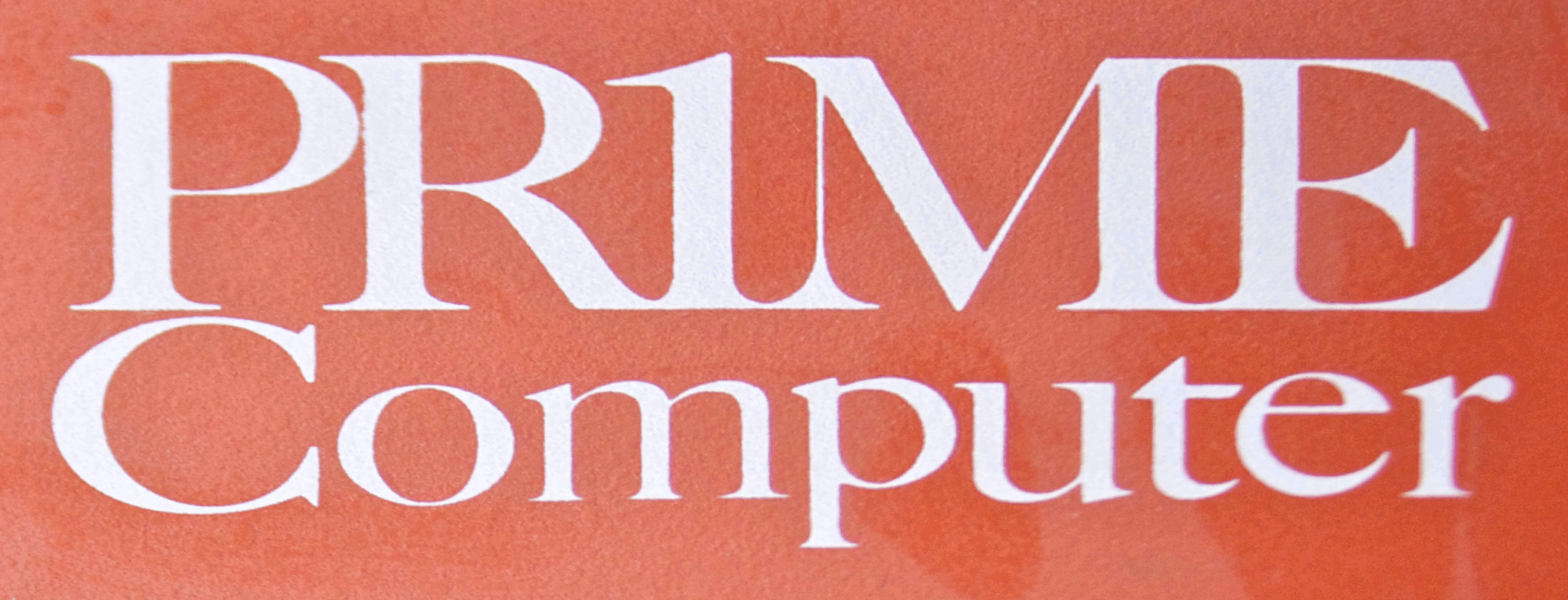 Logo